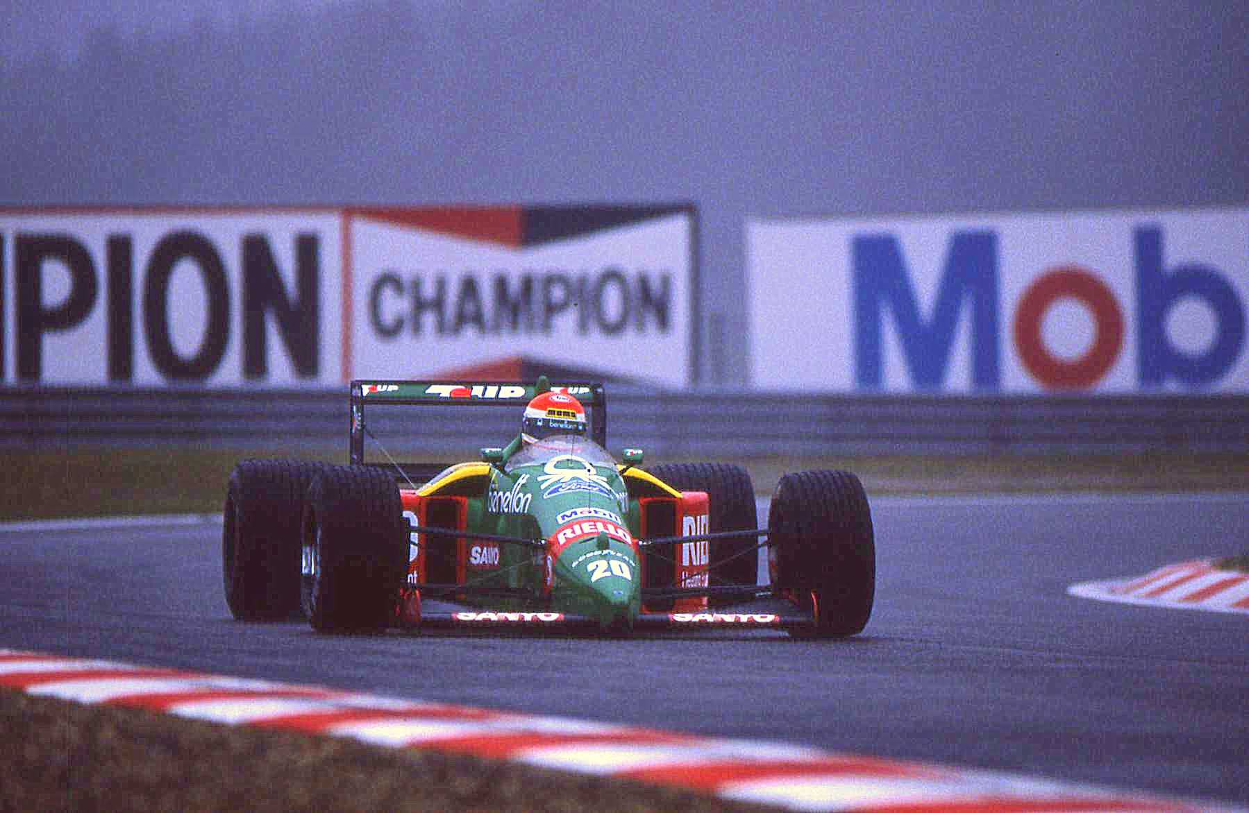 Emanuele Pirro - Benetton-Ford. Scan Diapo argentique.